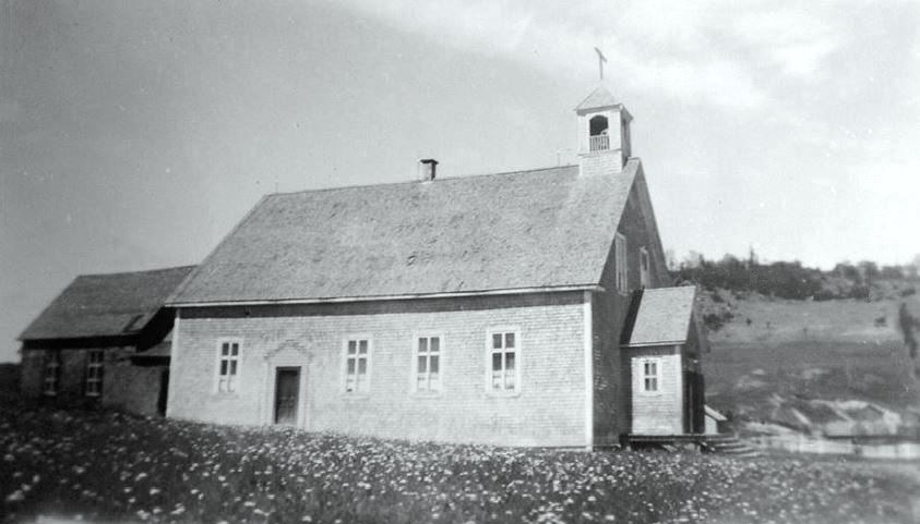 Église Saint-Vianney, 1er août 1943 (écrit au verso de la photo) - une photo dans l'album de famille de ma mère